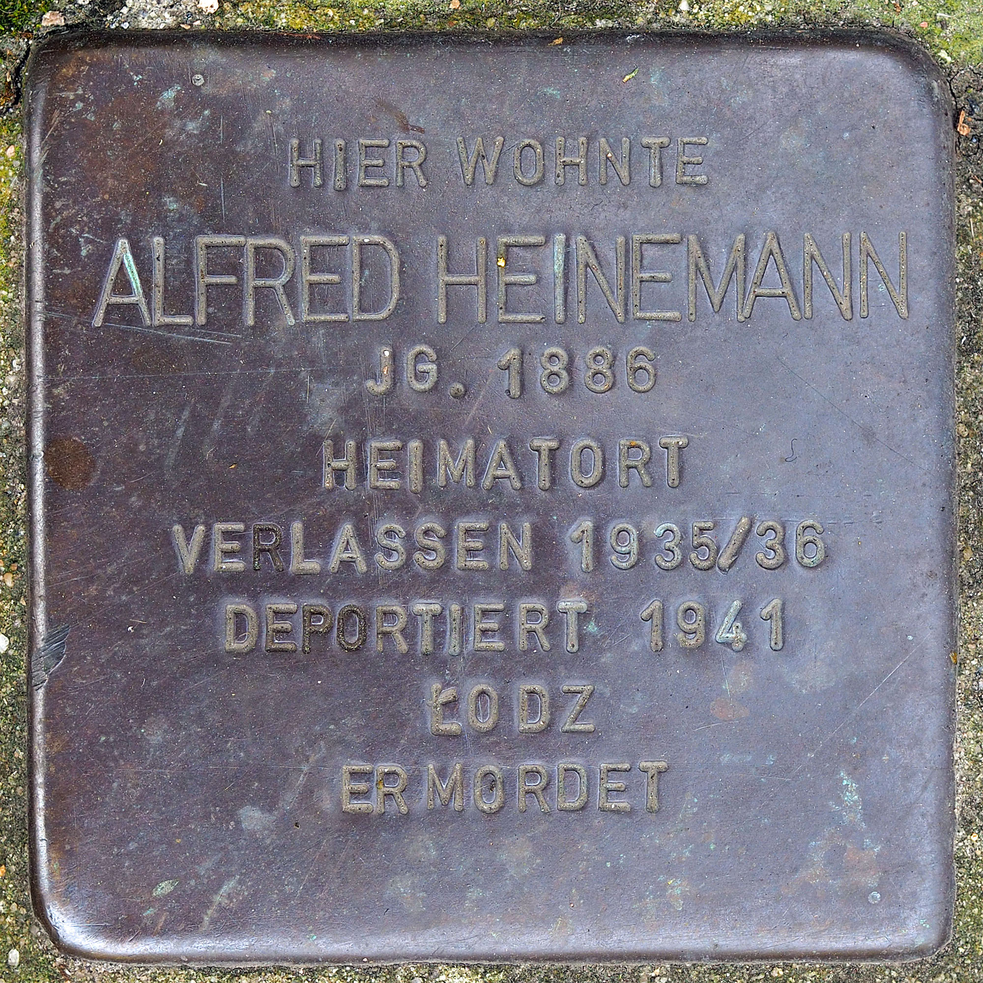 Stolpersteine GV: Heinemann, Alfred